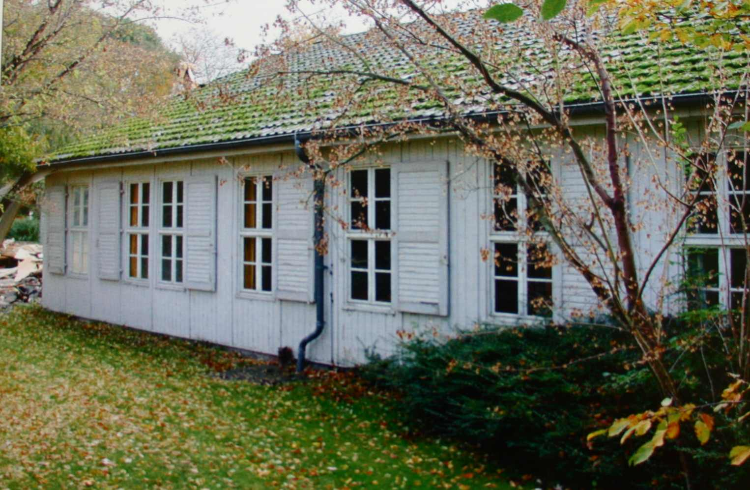 Baracke des ehemaligen KZ Außenlagers Neustadt